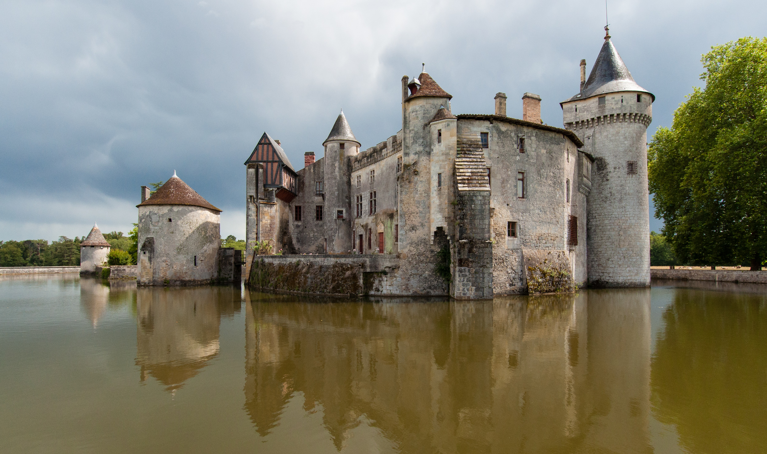 Château de La Brède en Gironde qui fut la demeure de Montesquieu .